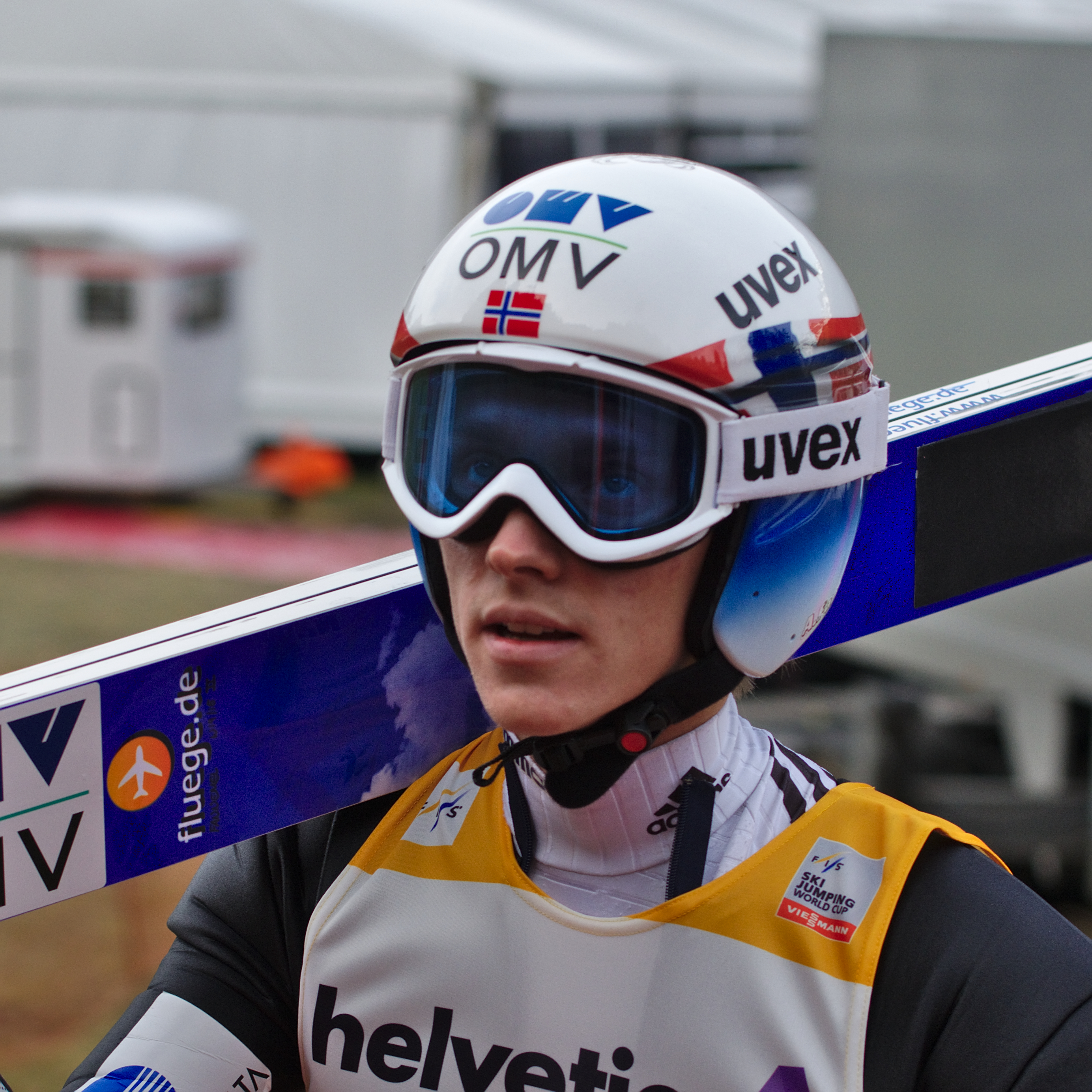 FIS Ski Jumping World Cup 2014 - Engelberg - 20141221 - Anders Fannemel